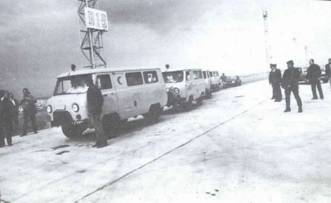 פיגוע האוטובוס במצרים (1990) - שיירת האמבולנסים של הסהר האדום הנושאים את ארונות המתים בפיגוע בשדה התעופה של קהיר.